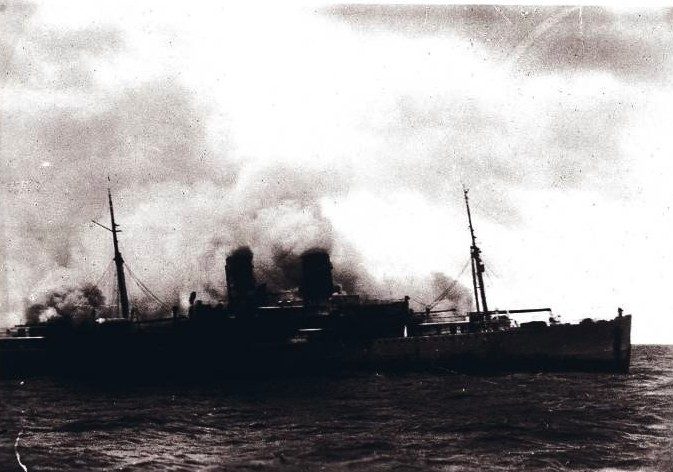 Der brennende Afrika-Liner WATUSSI vor dem Untergang